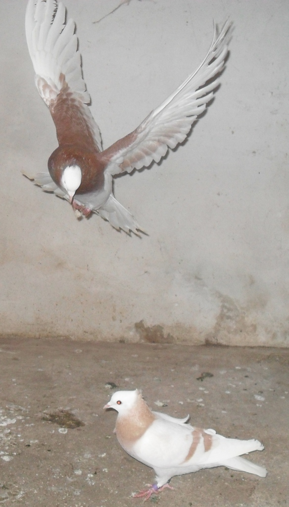 Ringschlag (Rheinische Ringschläger, rotfahl)